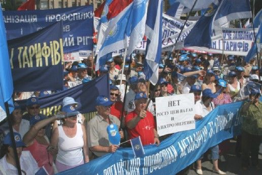 Акція протесту ФПУ проти підвищення комунальних тарифів, травень 2006 року